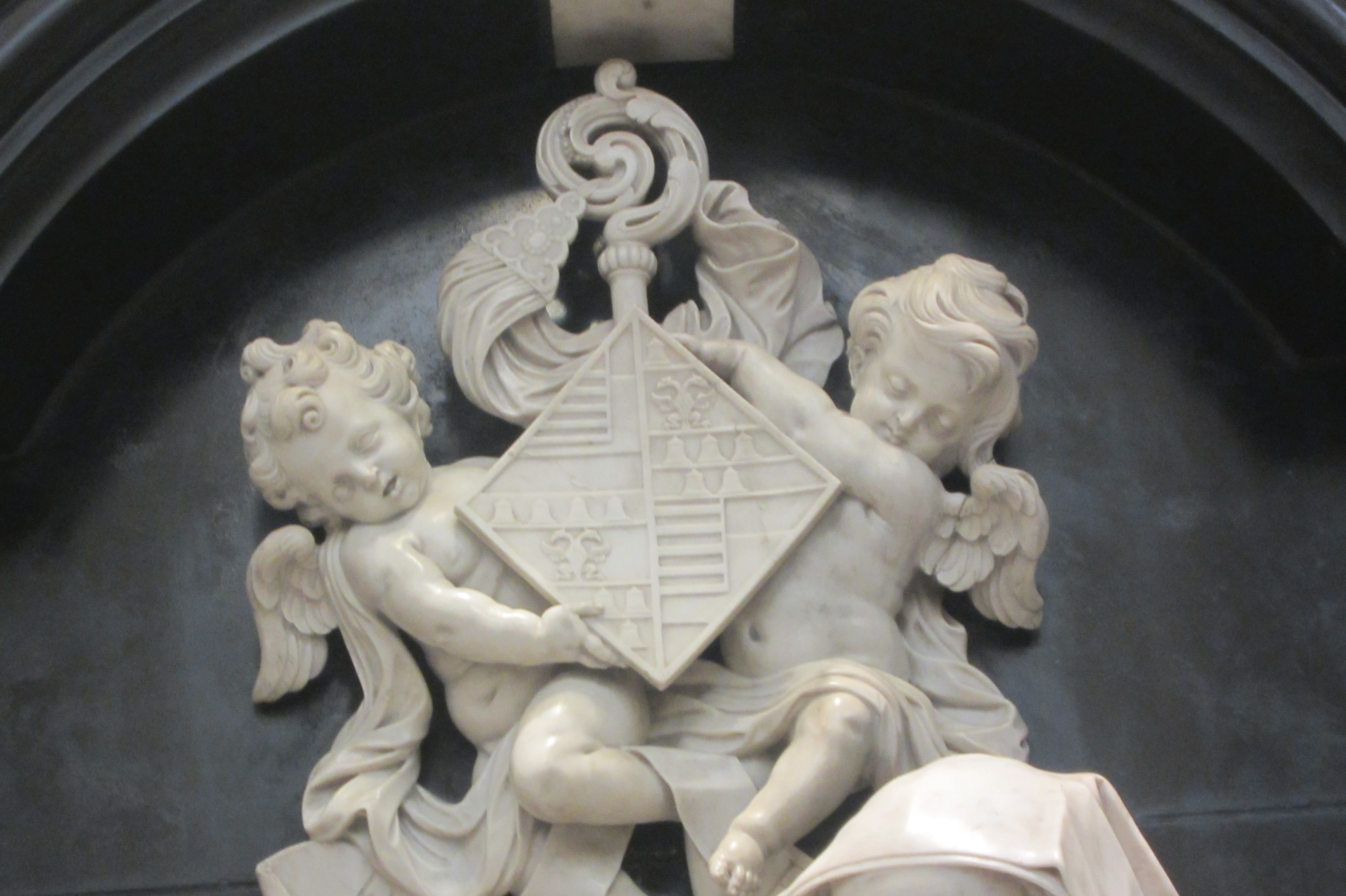 Stenen wapen abdis van Herkenrode Anna Catharina de Lamboy, in de O.L.Vrouwebasiliek te Hasselt, België